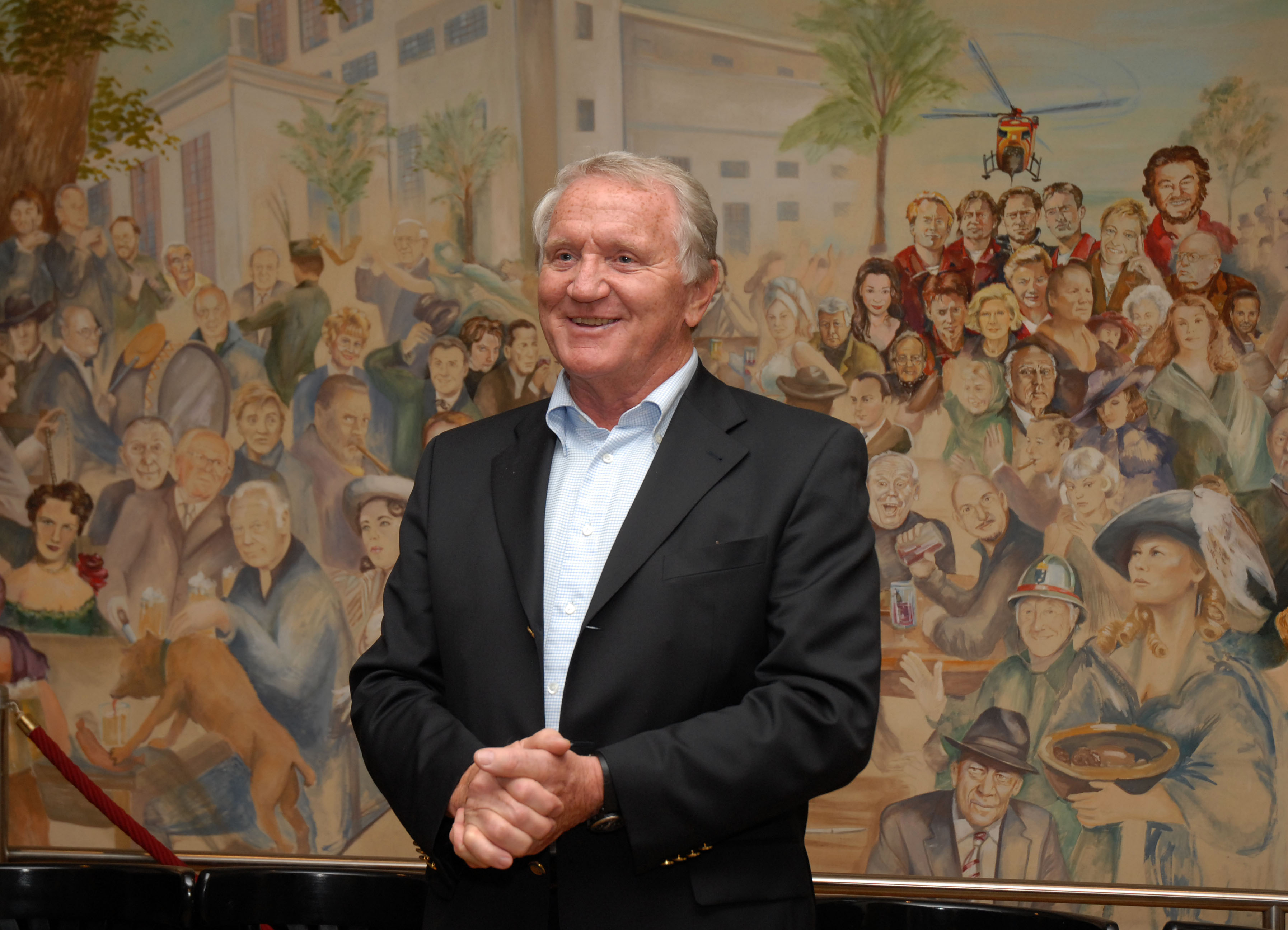 Filmstadt Wien